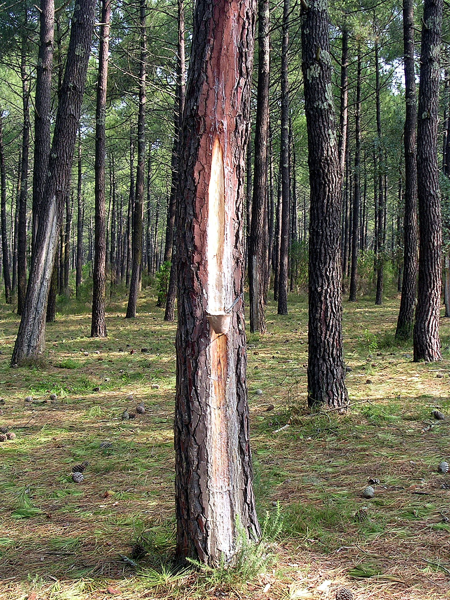 Gemmage de Pinus pinaster à Mimizan (Landes, France)